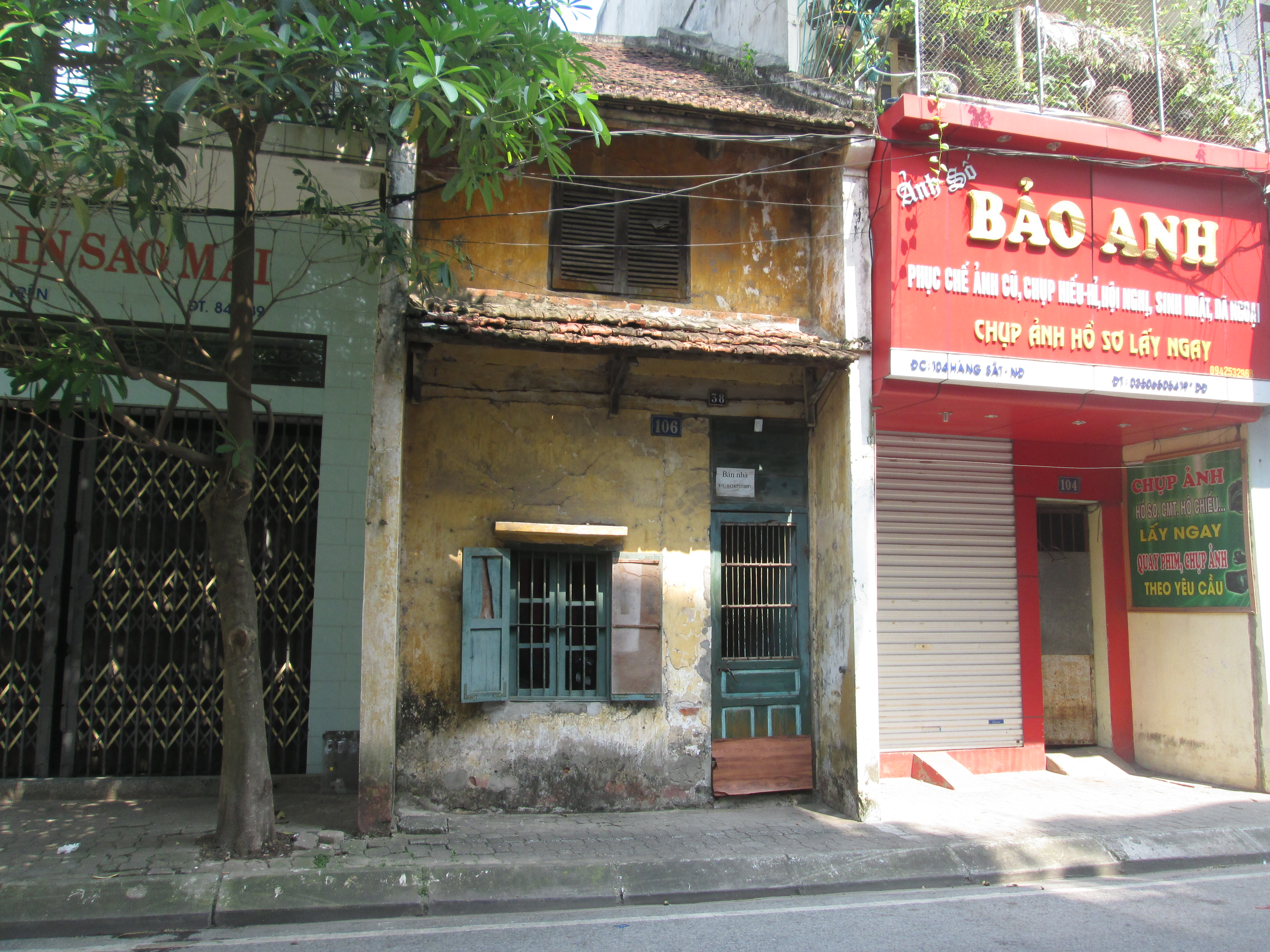 Ngôi nhà cổ mang phong cách Việt ở số 106 Hàng Sắt, thành phố Nam Định, tỉnh Nam Định.Xây dựng vào thời Nguyễn.